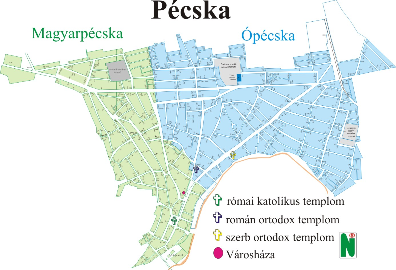 Pécska város térképe, készítette és közlését engedélyezte Nagy István, Pécska. Magyarpécskát 1960. szeptember 30-án csatolták Románpécskához, létrehozva Pécskát. A képen látható régi házszámook 2003-ig maradtak fenn, amikor utcaoldalankénti páros és páratlanra lettek változtatva, ugyanakkor az utcák meg lettek számozva. Ennek oka, a polgármester szerint, hogy az identitáshordozó személyiségnevek ne okozzanak nemzetiségi töltetű ellenszenvet. A döntést ellenző RMDSZ-es tanácsosok kultúra- és hovatartozás-pártoló érvei süket fülekre találtak.